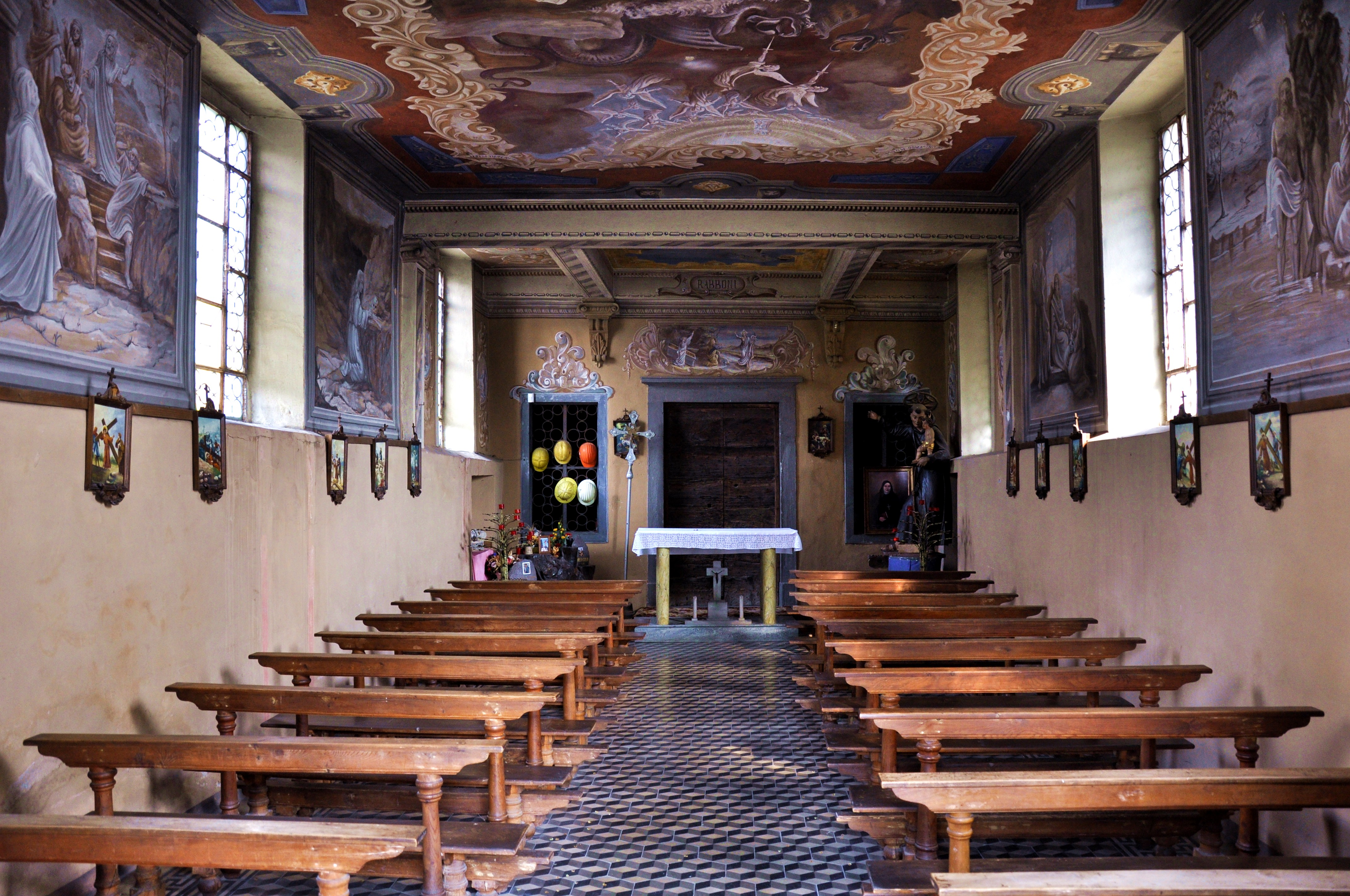 Interno chiesa di Santa Maddalena sul colle di Cristo Re, in Bienno (BS)